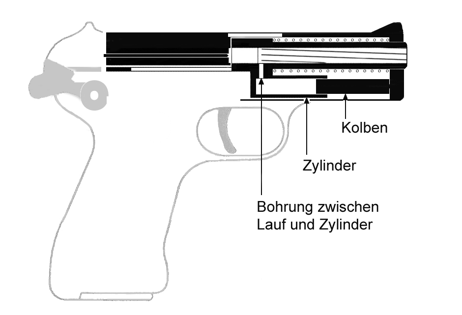 Pistole mit gasverzögertem Verschluss (Schema)